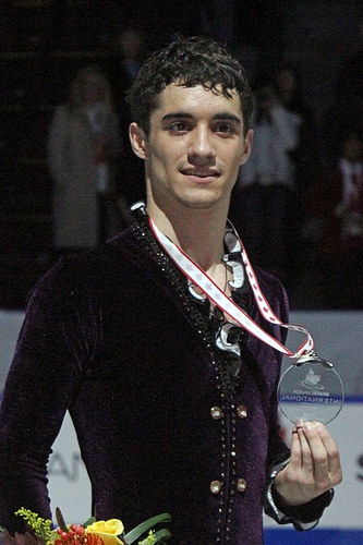 Хавьер Фернандес с серебрянной медалью 2011 Skate Canada International.